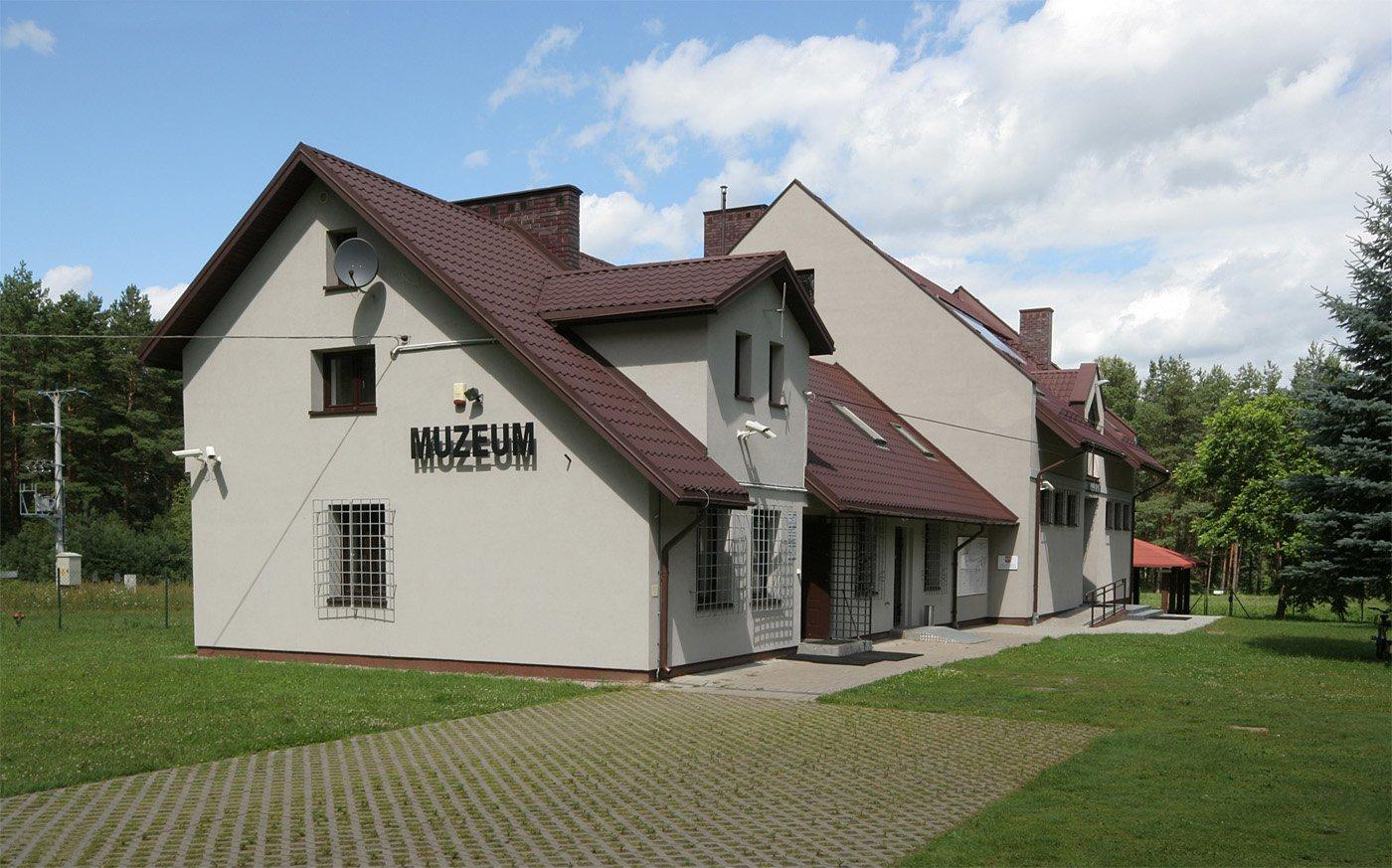 Budynek muzeum, w którym jest wystawa o historii obozu